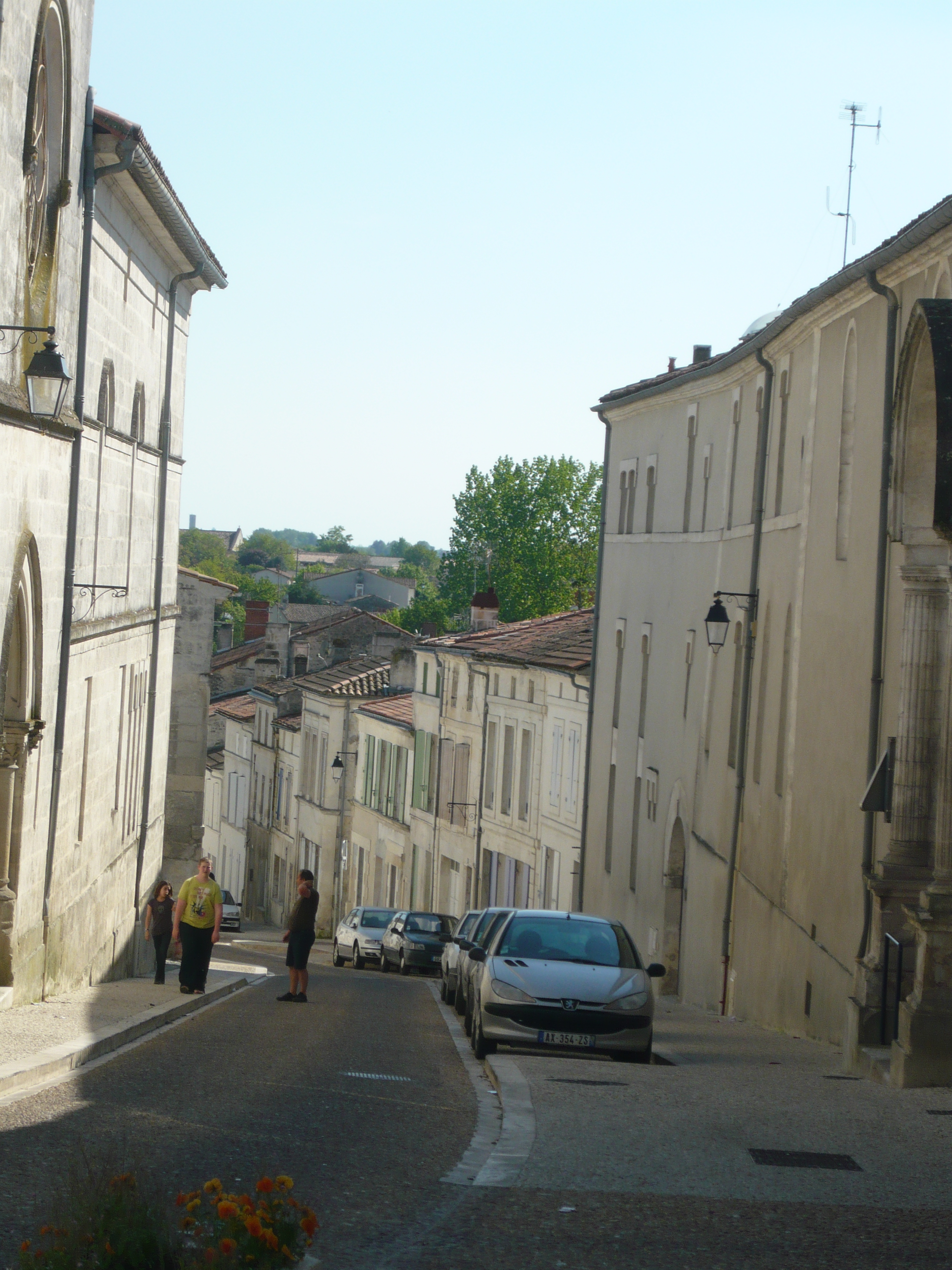 La rue Roosevelt à Pons (17)